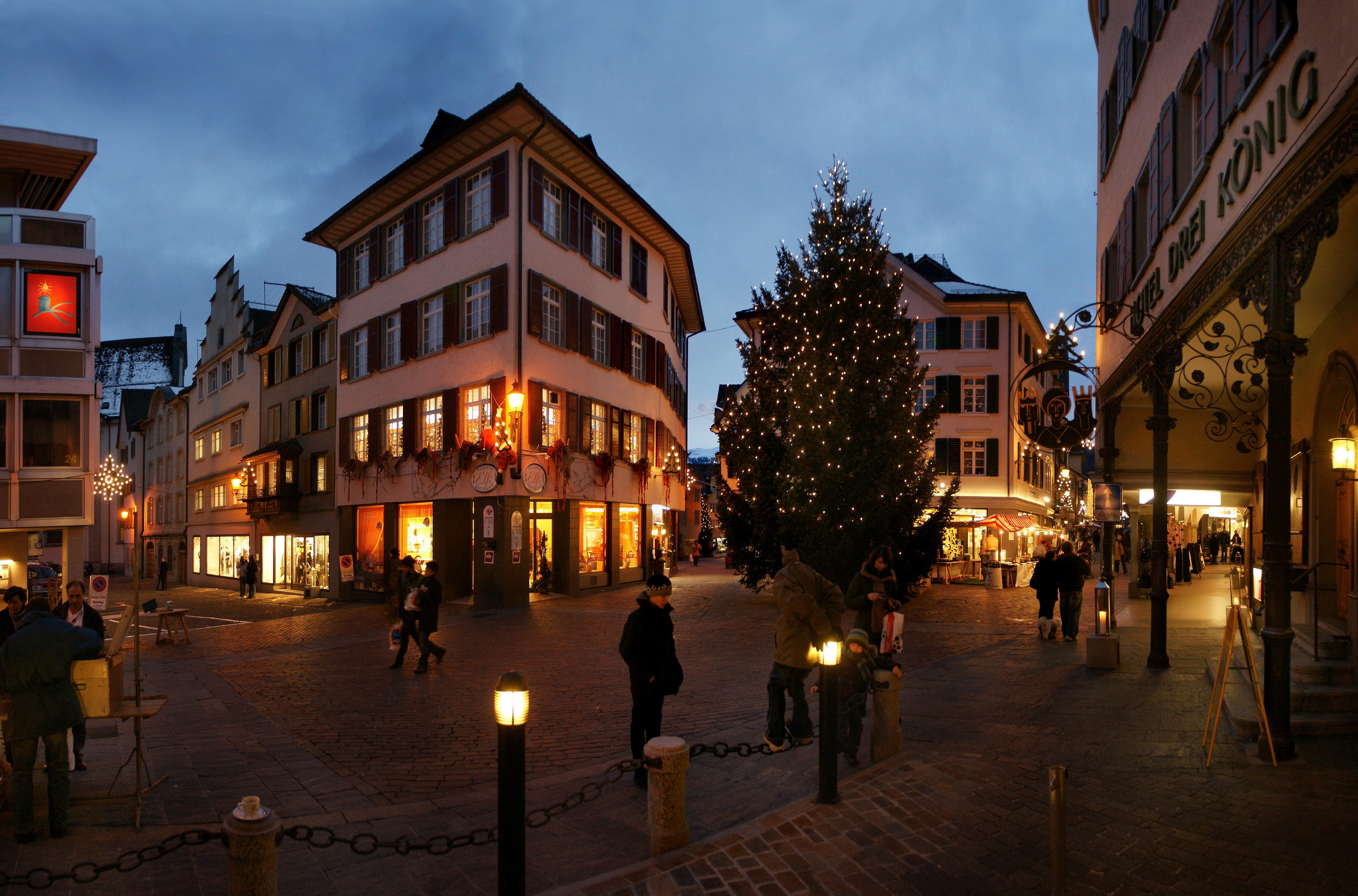 Panorama zur Vorweihnachtszeit im "Städtle" von Altstätten.